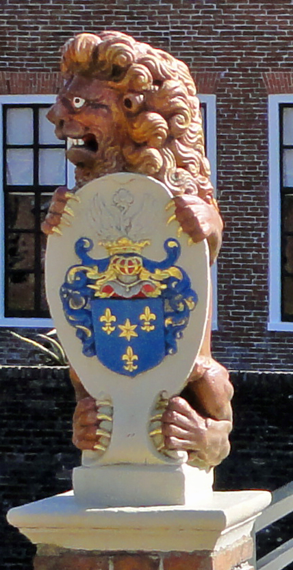 Leeuw met het wapen van Alberda voor de Menkemaborg in Uithuizen